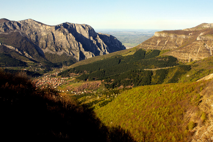 Вратцата